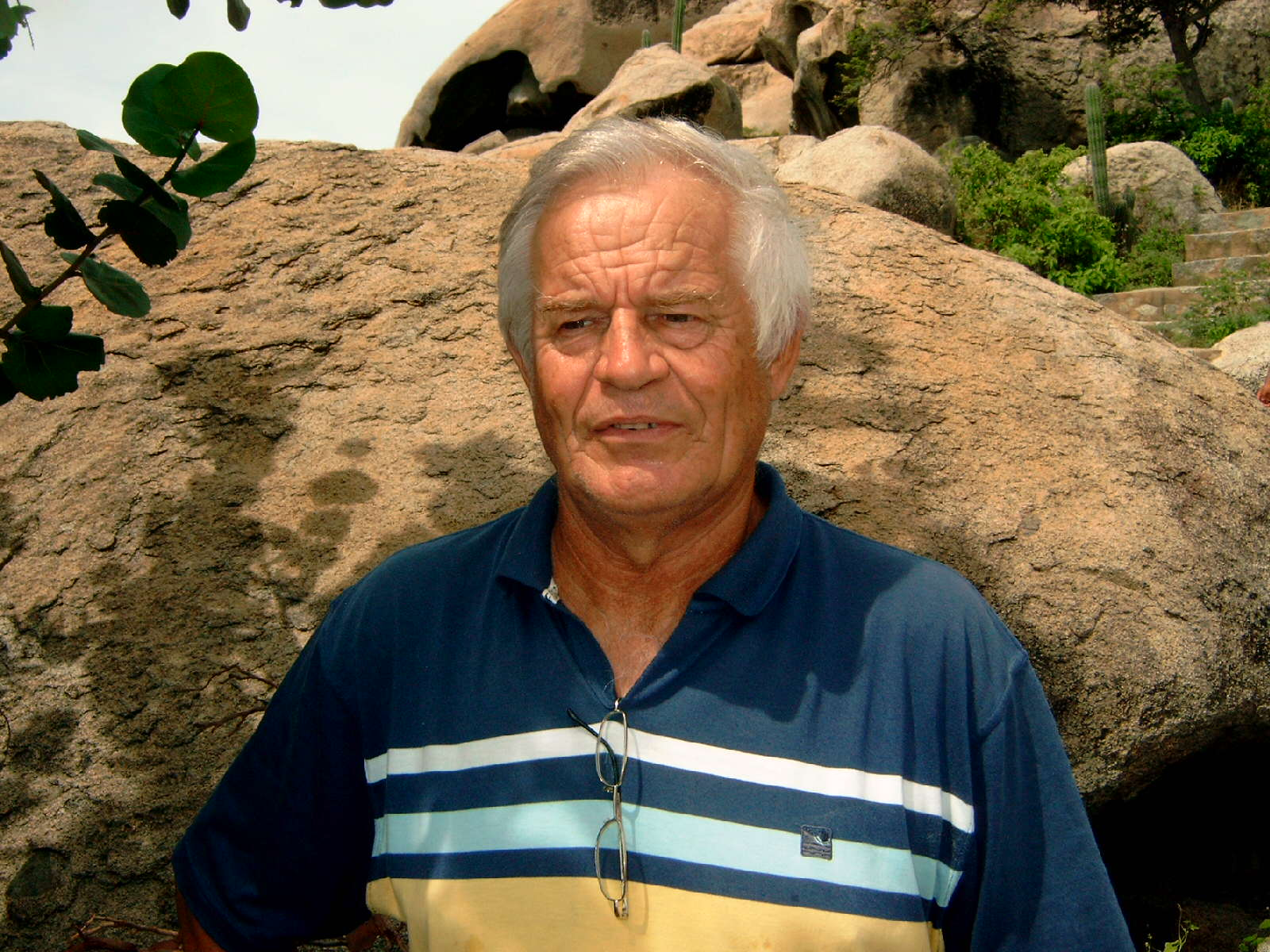 Wim Rutgers op Aruba, okt. 2005. Eigen opname. Wim Rutgers is een criticus, Surinamist en literatuurgeschiedschrijver